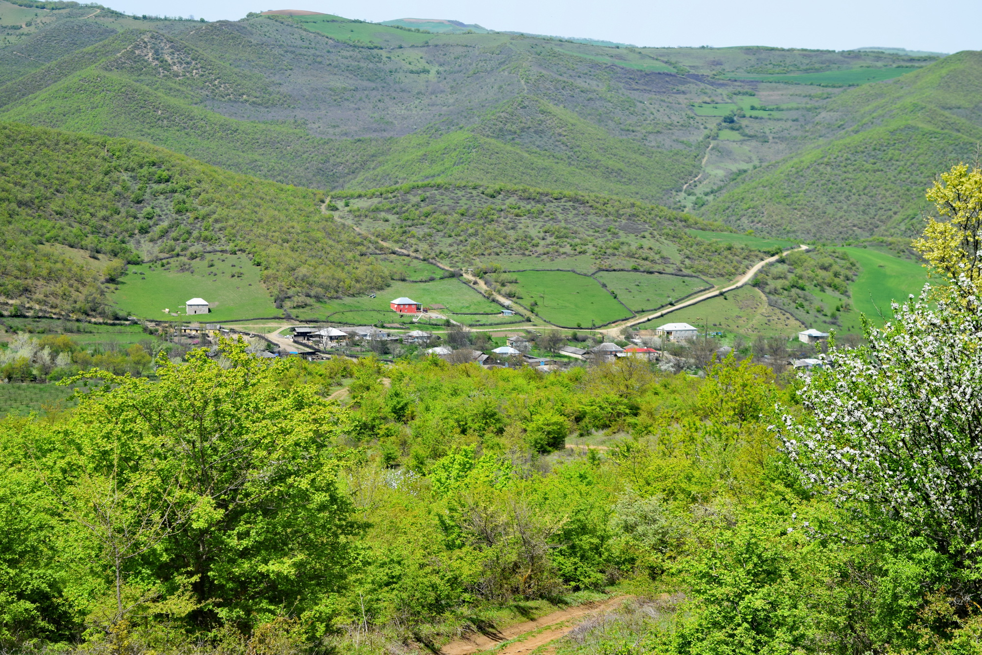 Zeyvə kəndi